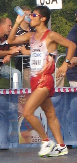 Чемпионат мира по лёгкой атлетике 2013. Ходьба 50 км, мужчины. Пелотон